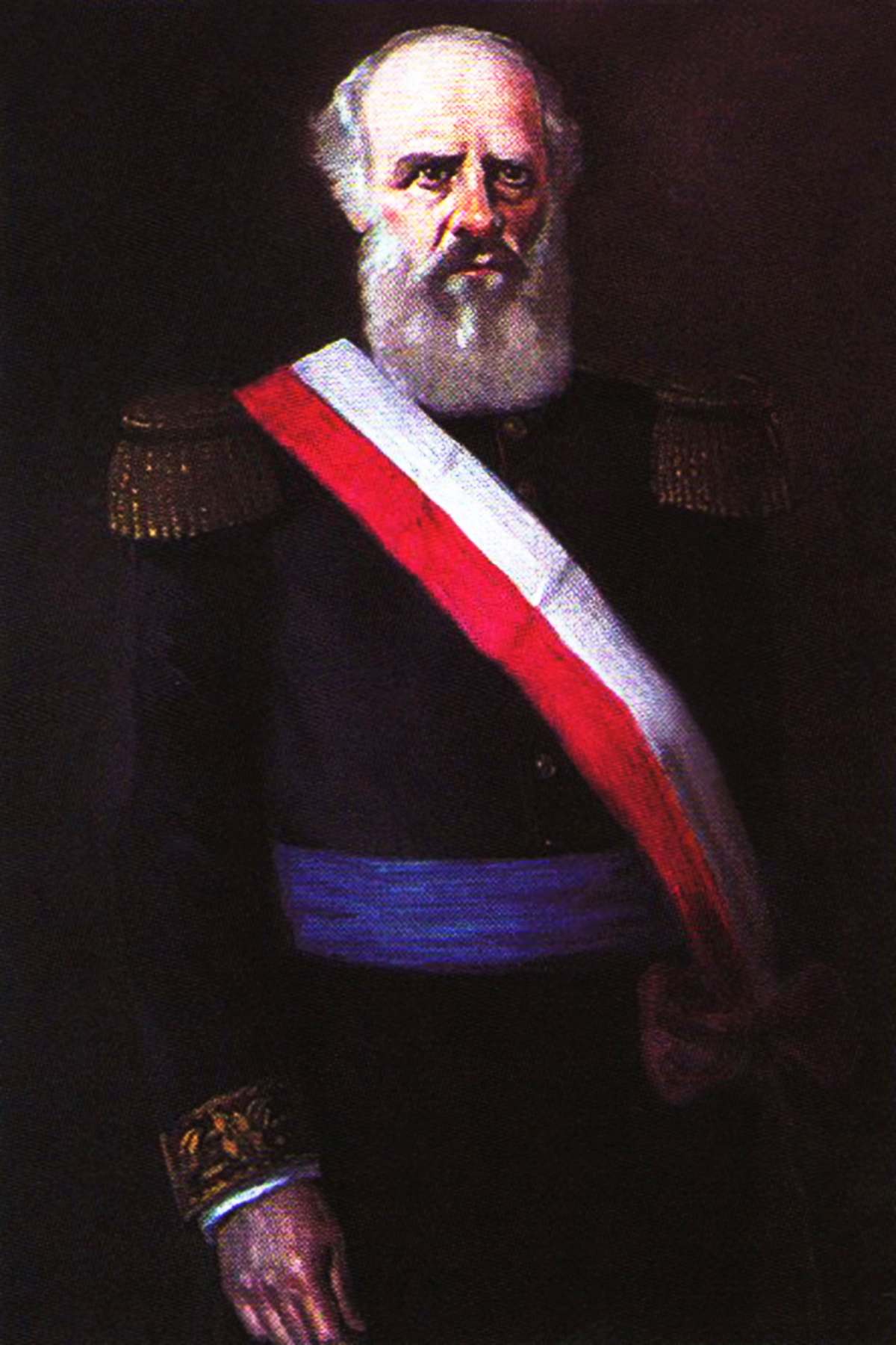 Presidente del Perú desde 1851-1855